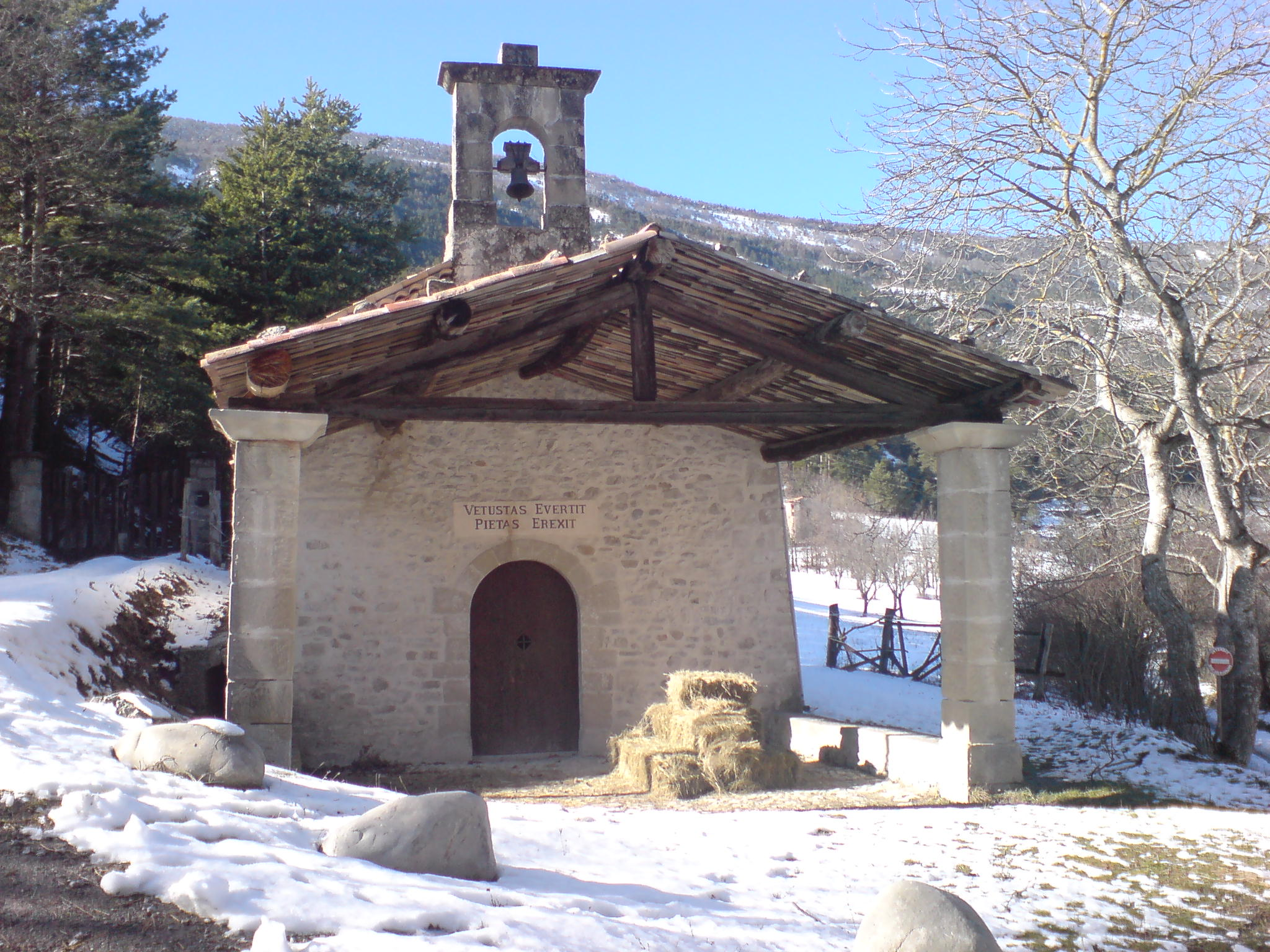 Chapelle de Vérimande, rive droite de la Vaïre